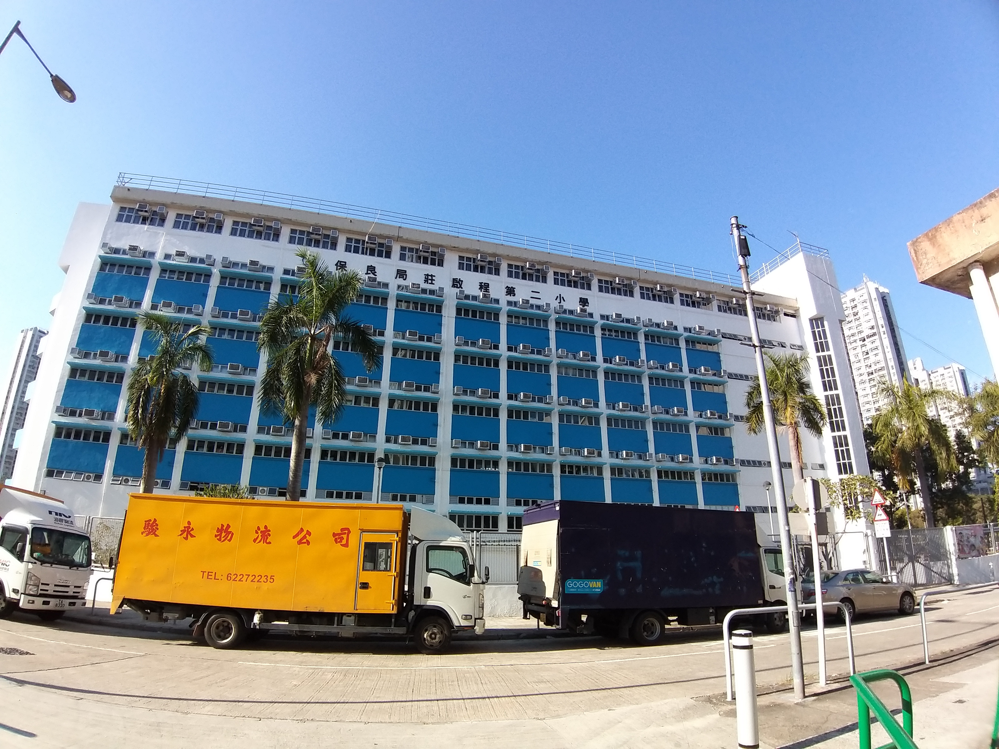 由釋慧文中學翻新而成的莊二-正立面